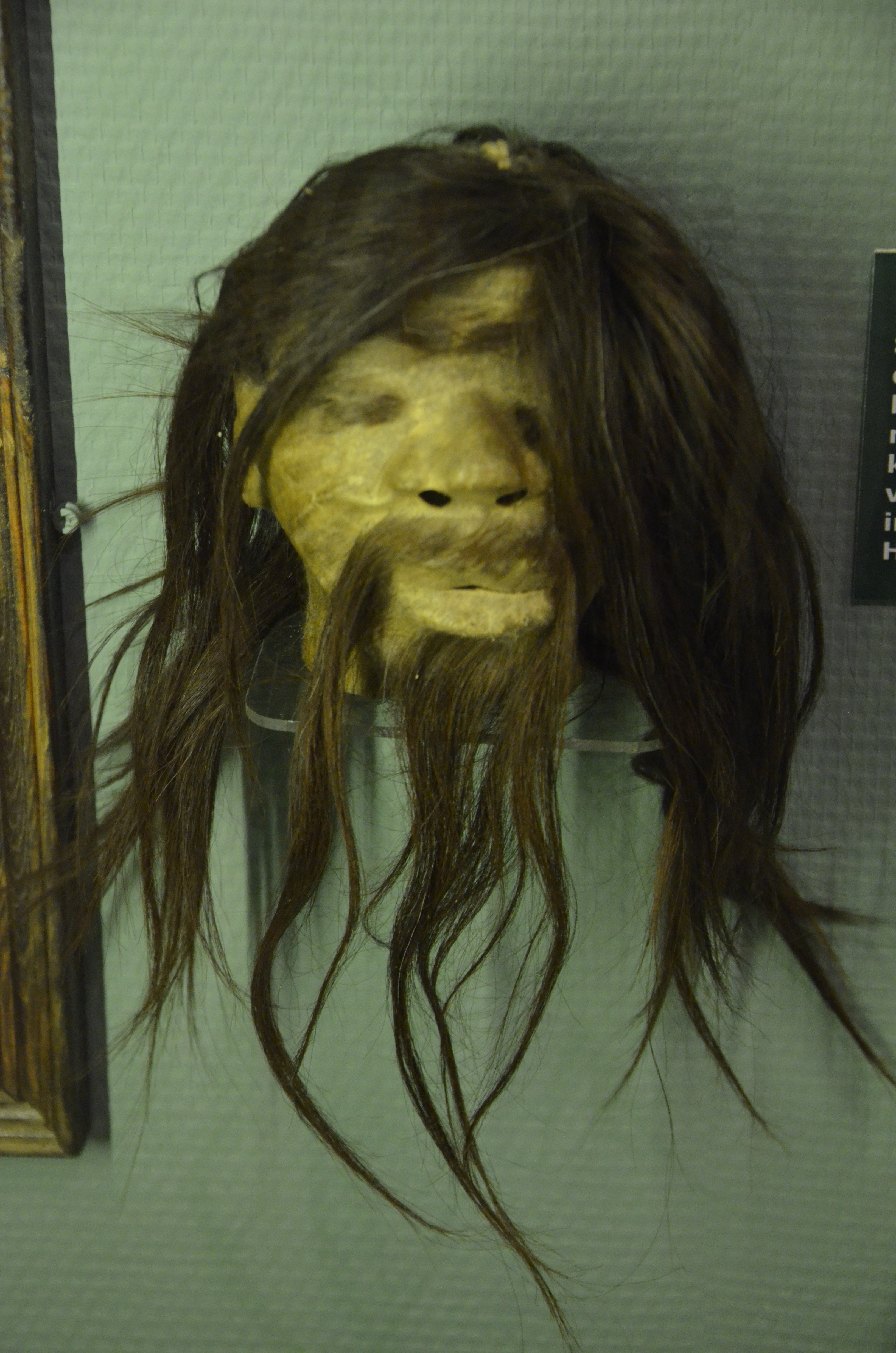 Tsantsa från Jivaroindianer i Equador, 1900-20, på Marstal Söfartsmuseum